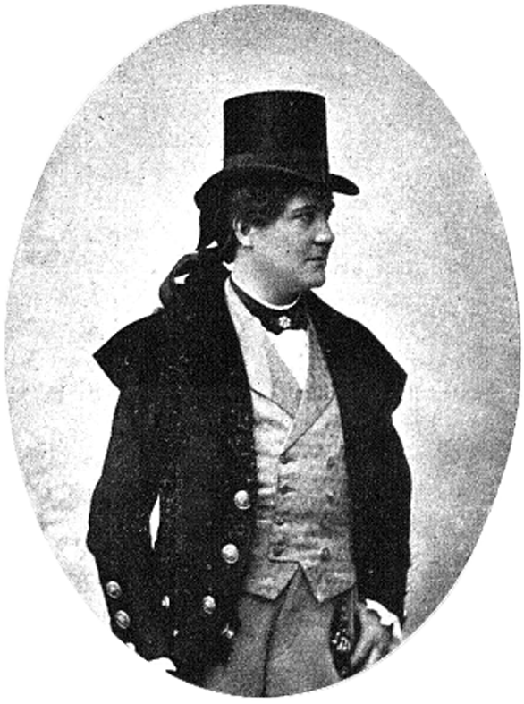 Franz Naval (eigentlich: Pogacnik, 1865–1939)